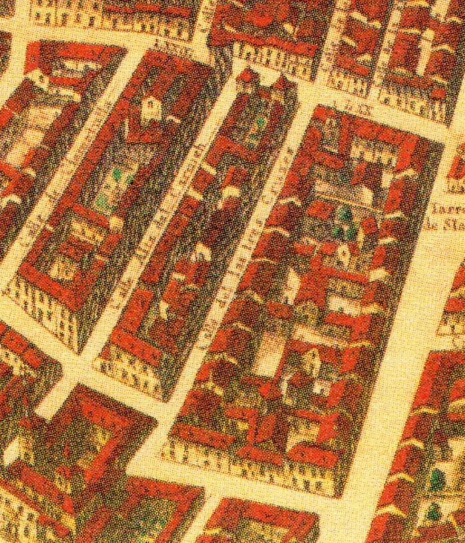 Topografía de la Villa de Madrid descrita por Don Pedro Texeira en 1656, en la cual se demuestran todas las calles al largo y ancho de cada una de ellas, las rinconadas y lo que tuercen las Plazas, fuentes, jardines y huertas con la disposición que tienen las parroquias, Monasterios y Hospitales están señalados sus nombres con letras y números que se hallaran en la tabla y los demás edificios, torres y delanteras de las casas de la parte que mira al Mediodía están sacadas al natural que se podrán tocar las puertas y ventanas de cada una de ellas.